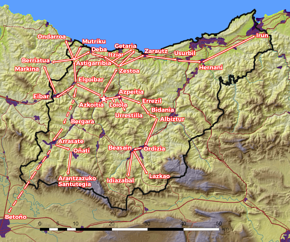 1766ko matxinadaren mapa. Datuak bermarraztuak Otazu y Llanaren "La burguesía revolucionaria vasca" liburutik, eta oinarri gisa erabili da.